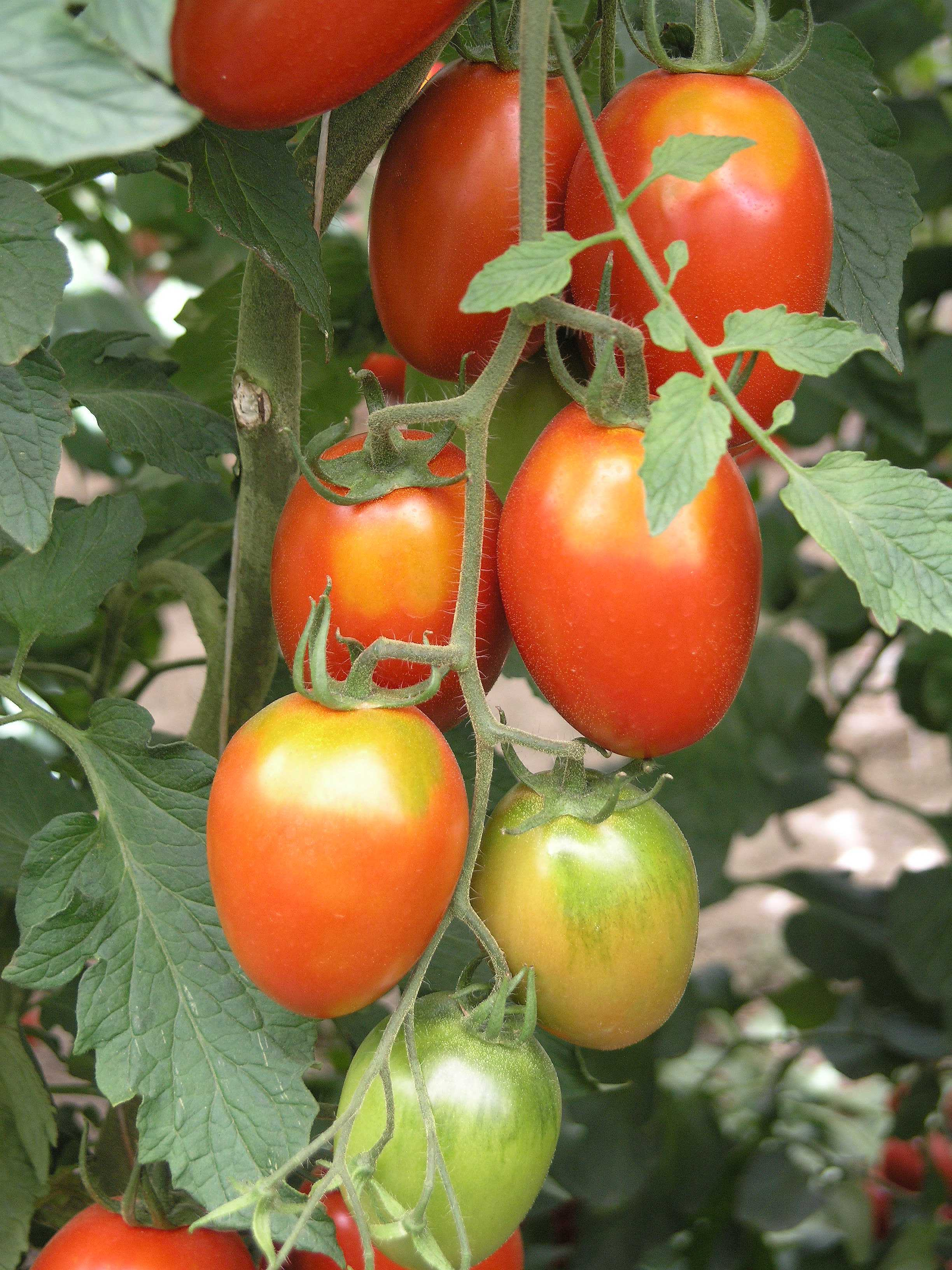 Tomate durch Hitze mit Grünkragen